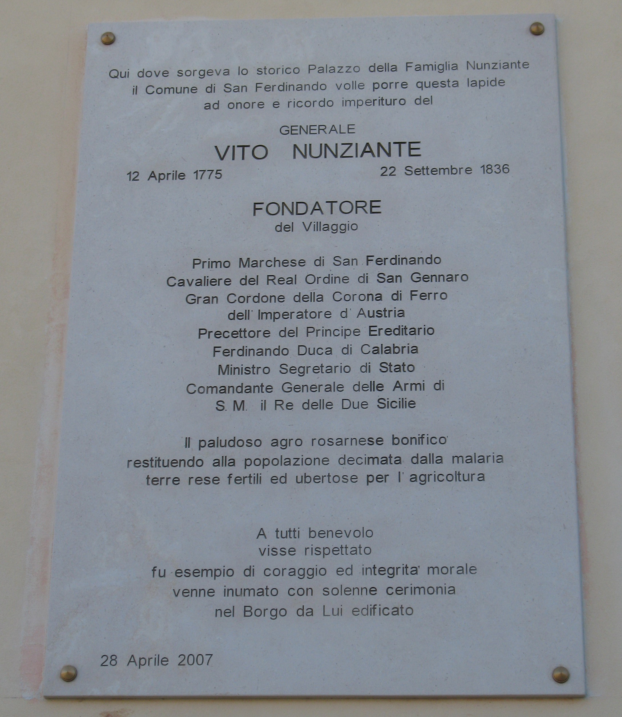 San Ferdinando, municipio, lapide marchese Vito Nunziante